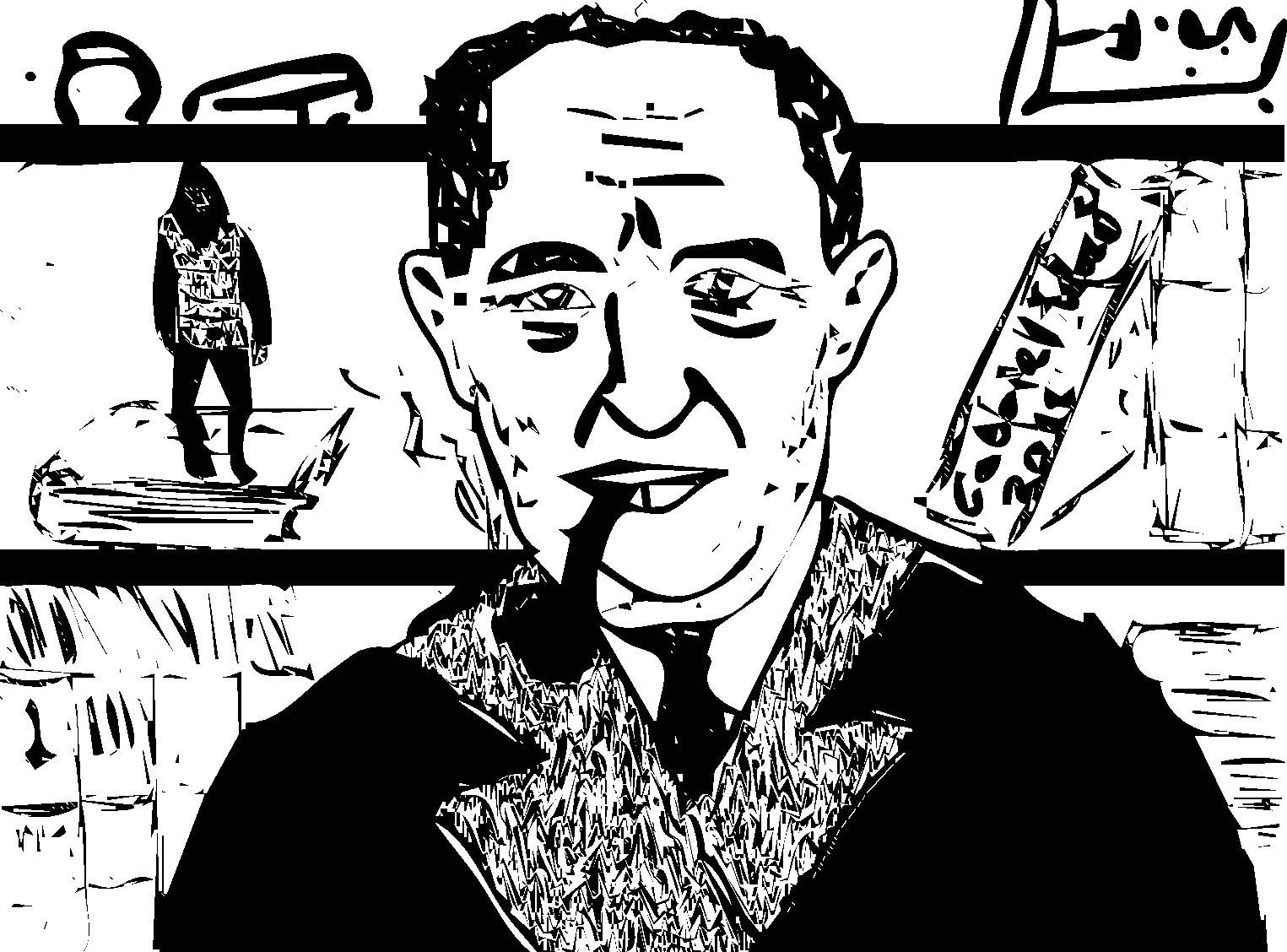 Pierre Boulle, por el grafista Gabriel Worst, dibujado en 2012